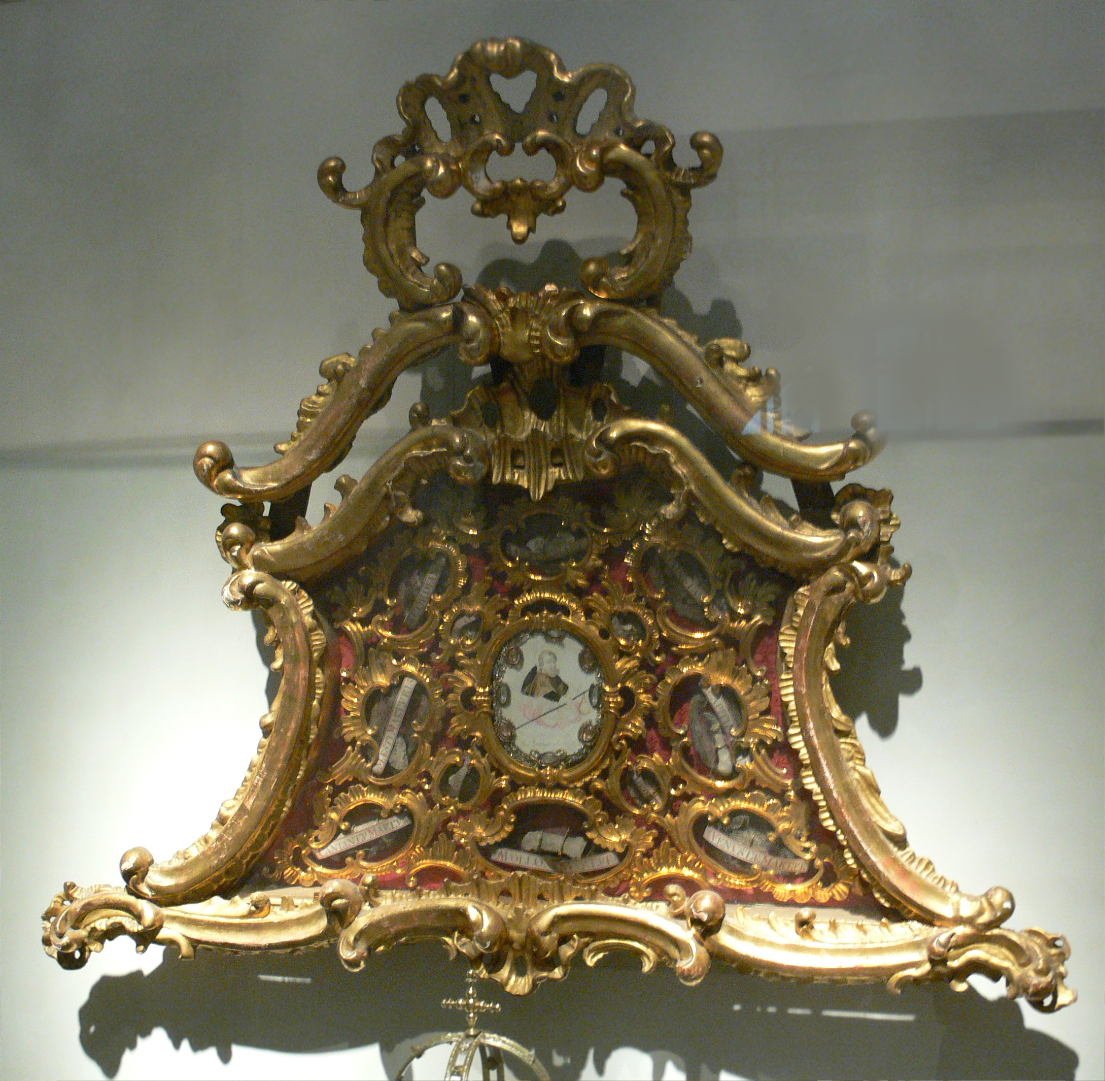 Diözesanmuseum Bamberg Reliquientafel mit dem hl. Jakobus, Holz / Gouache, 18. Jahrhundert